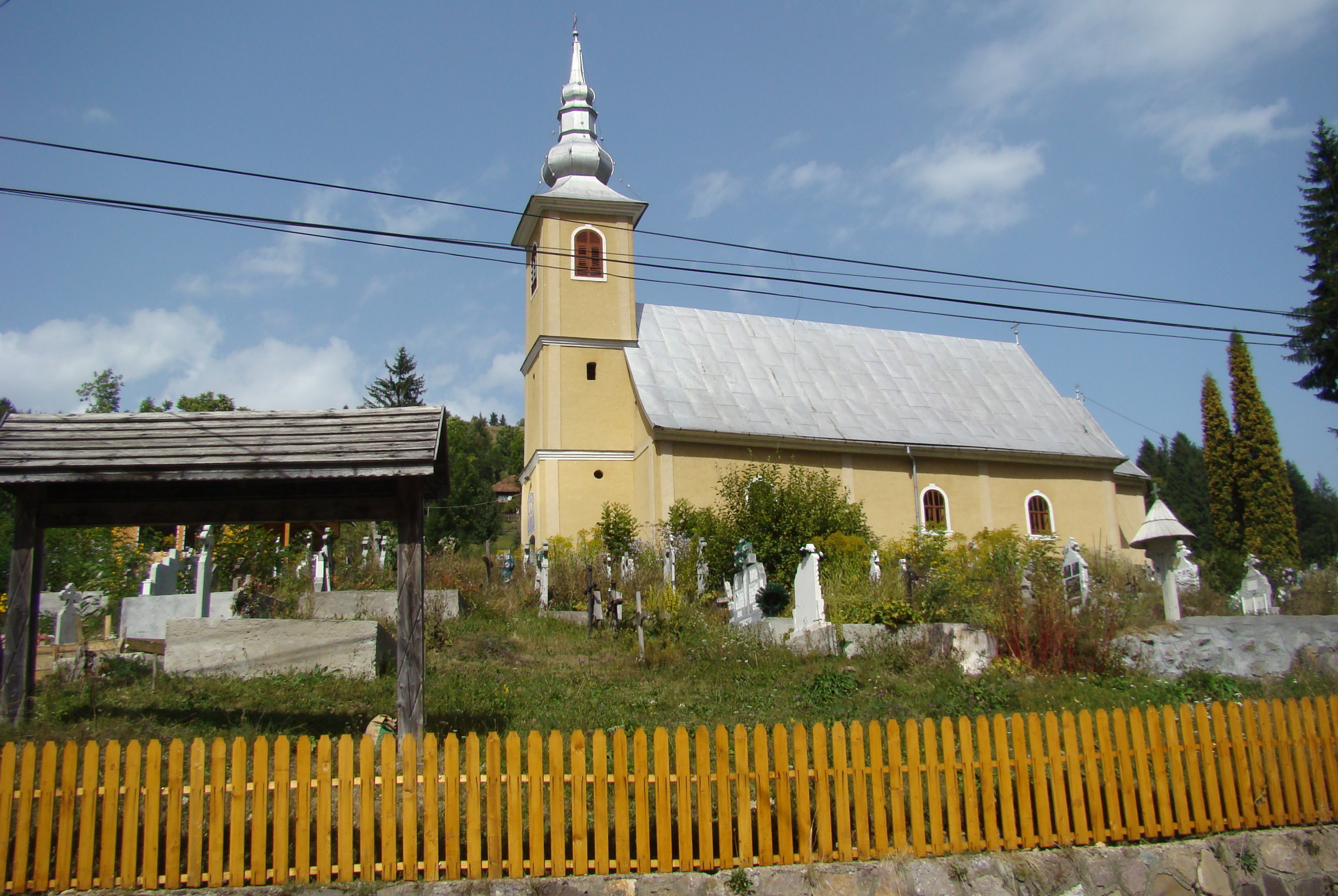 Biserica ortodoxă din Scărișoara, județul Alba